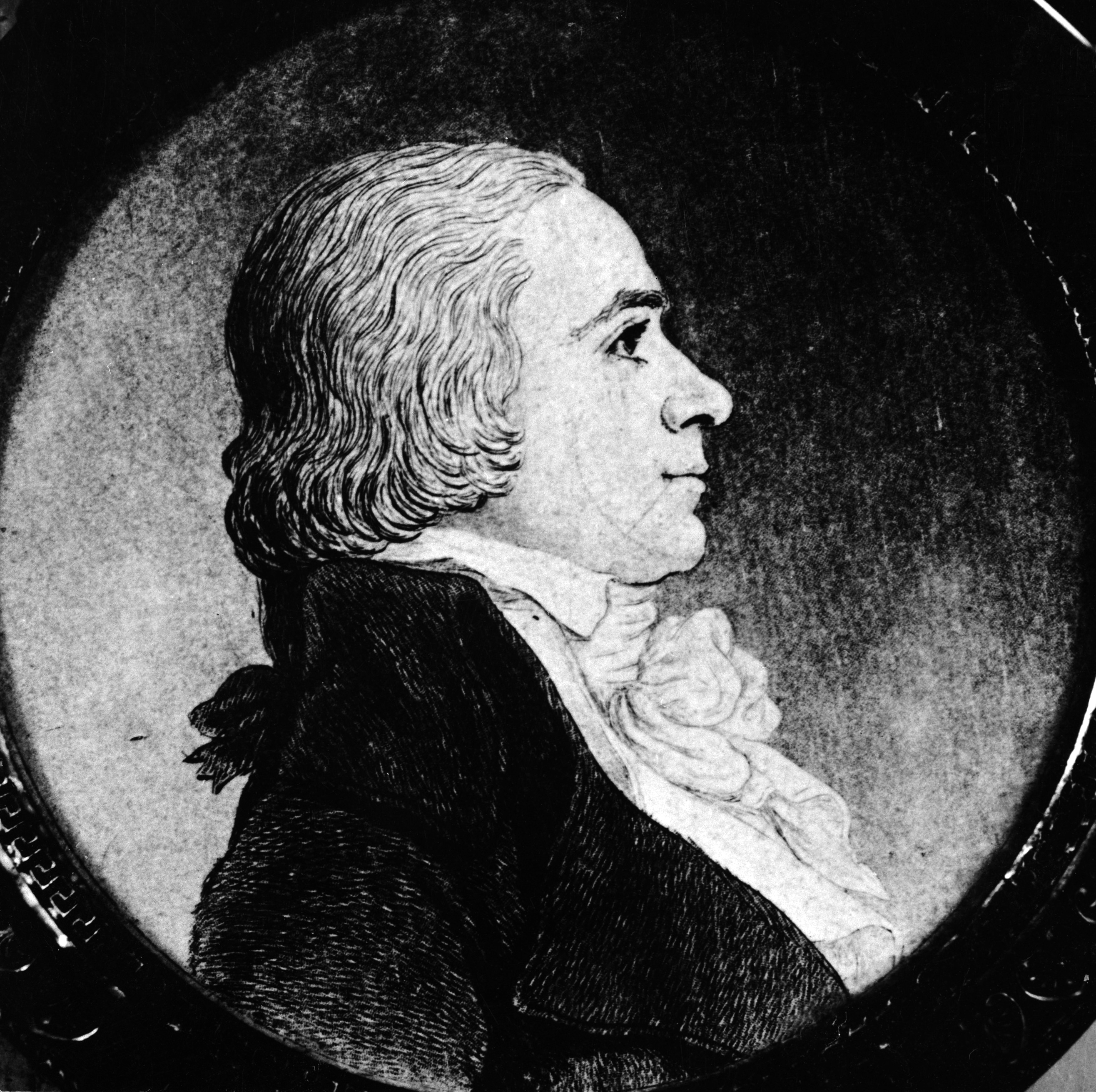 Format: Fotopositiv, avfotografert miniatyrportrett Dato / Date: Ukjent Fotograf / Photographer: Ukjent Sted / Place: Trondheim Wikipedia: Johan Christian Wildhagen (1763 - 1835) Geni: Johan Christian Wildhagen (1763 - 1835) Nasjonalbiblioteket: Daae, Aagot - Trondhjems Sparebank 1823 - 1923 (Trondhjem 1923) Eier / Owner Institution: Trondheim byarkiv, The Municipal Archives of Trondheim Arkivreferanse / Archive reference: Tor.H49.B03.F28734 Merknad: Norges første "sentralbanksjef" var Johan Christian Wildhagen (1763 - 1835), opprinnelig fra Slesvig i Sønderjylland og fra 1802 kompanjong i Trondheimsfirmaet Meinckes sønner & Co. Wildhagen var Norges Banks direktør fra 1816 til sin død i 1835. Han var også direktør i Trondhjems Sparebank 1824 - 1834.